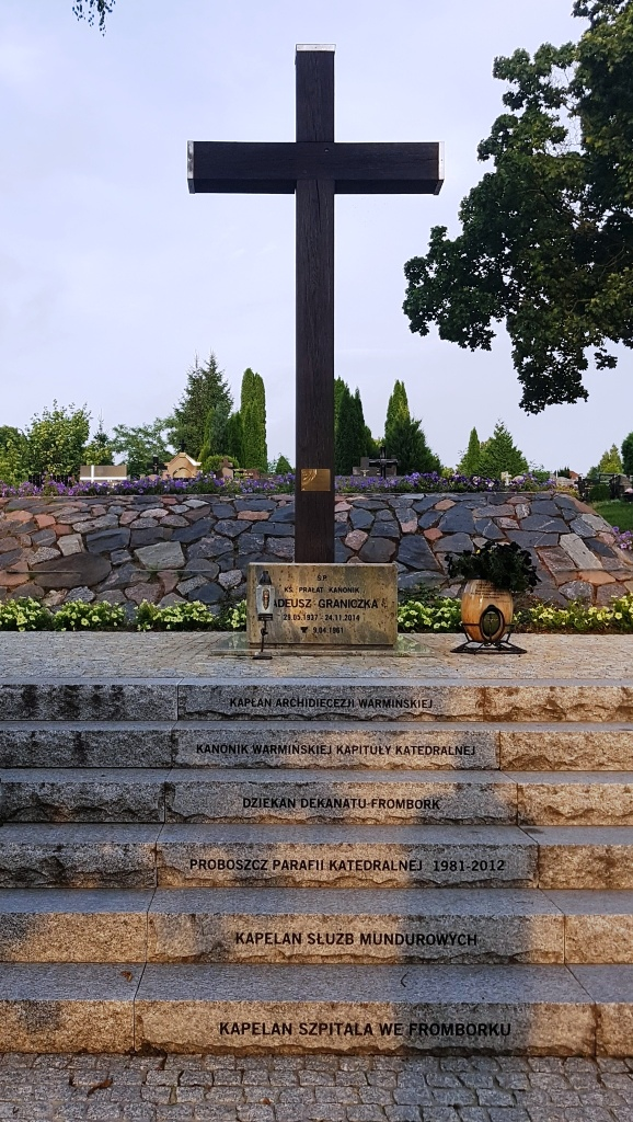 ks. Tadeusz Graniczka Frombork